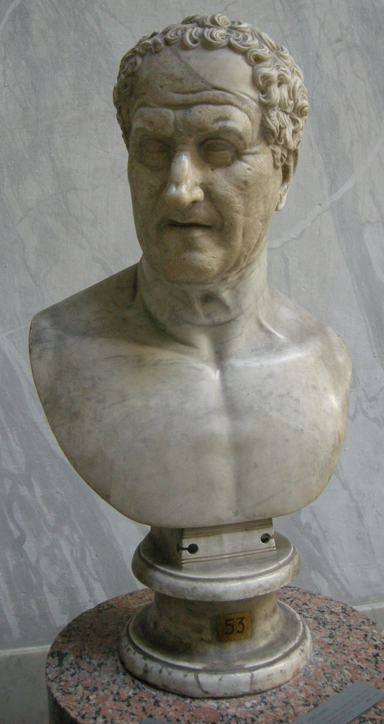 Ritratto maschile, rielaborazione di età flavia dal ritratto di Aulo Postumio Albino, console nel 99 aC. Musei Vaticani, Museo Chiaramonti - Braccio Nuovo, inv. 2261.